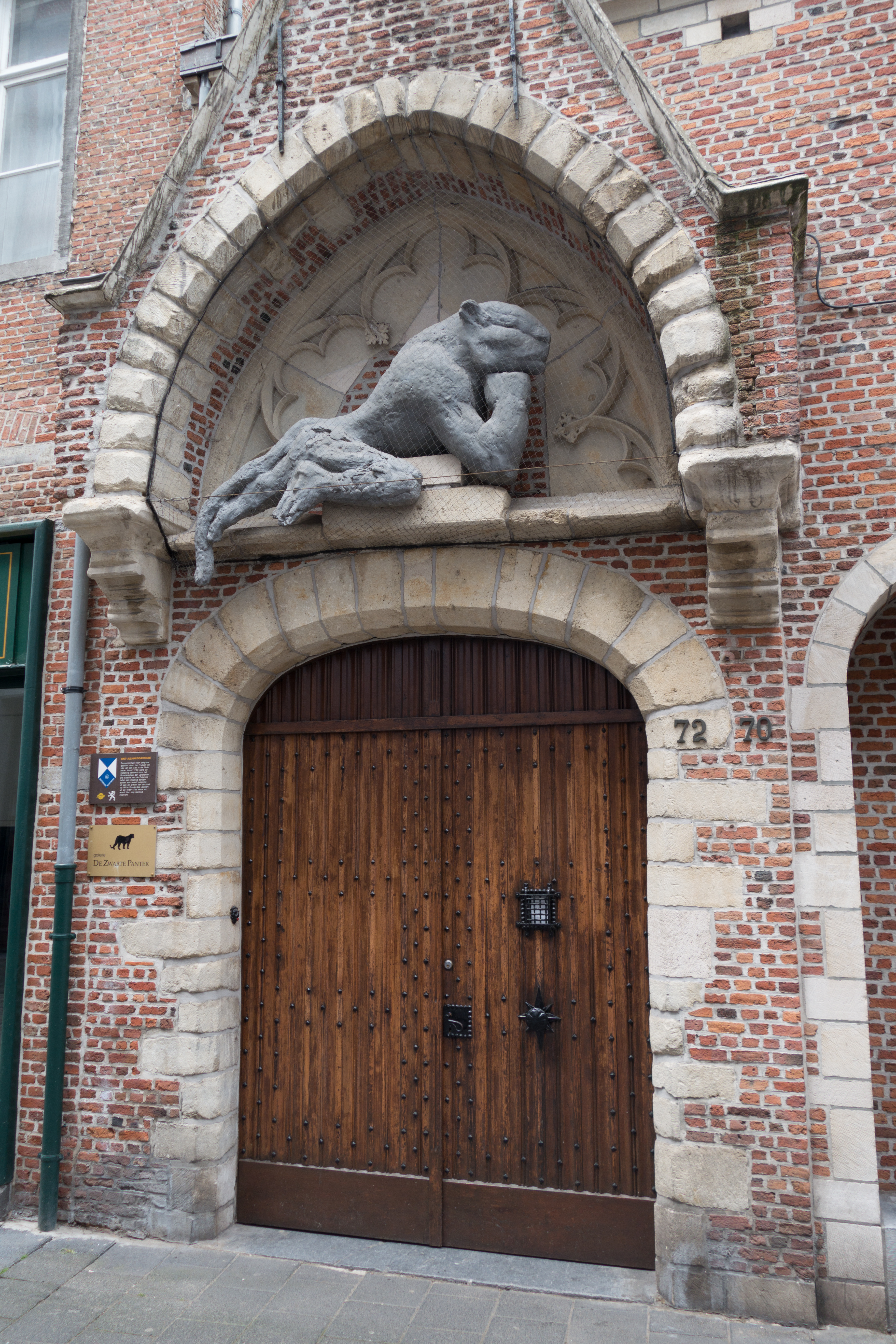 Sint-Julianusgasthuis, Hoogstraat 70-72, Anwerpen. Tegenwoordig gebruikt door kunstgalerij De Zwarte Panter.